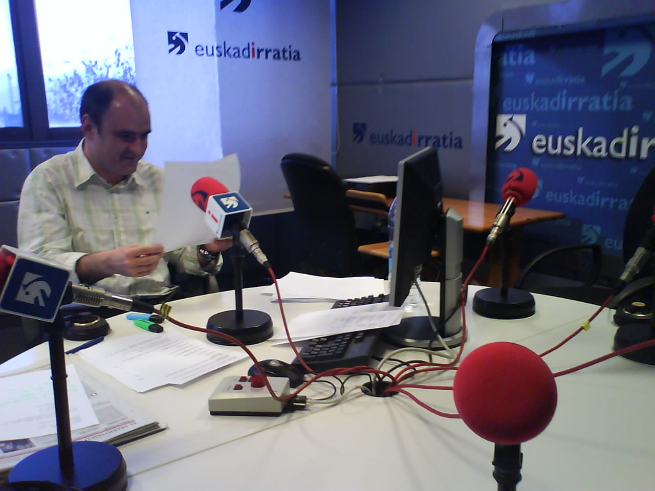 Manu Etxezortu Euskadi Irratian.